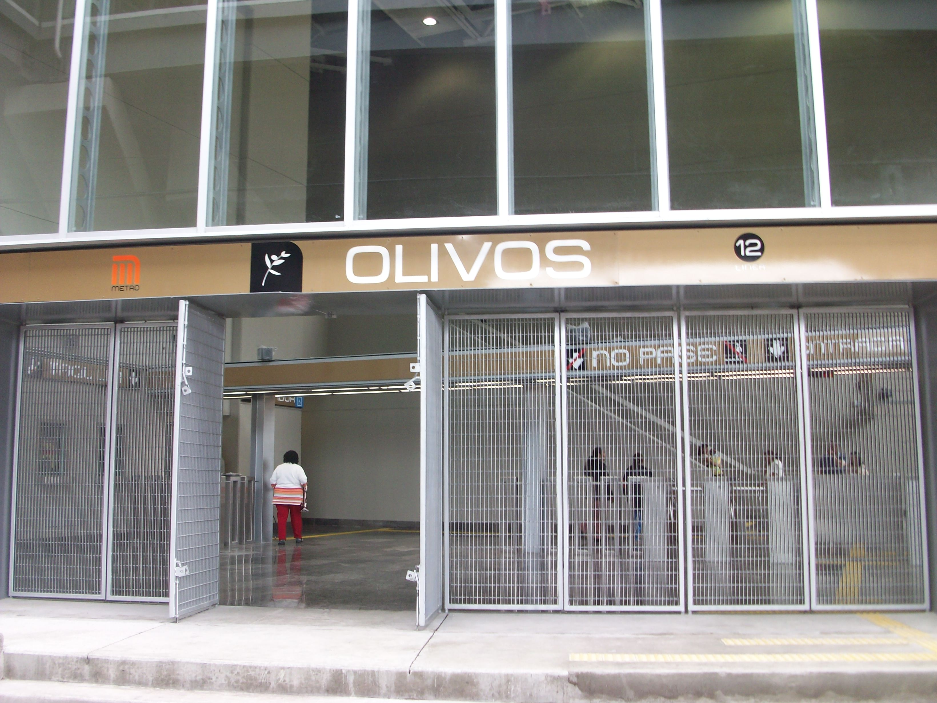 Acceso estacion Olivos